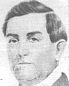 Retrato de Florentino Castellanos, Rector de la Universidad de la República de Uruguay entre 1852 y 1854.